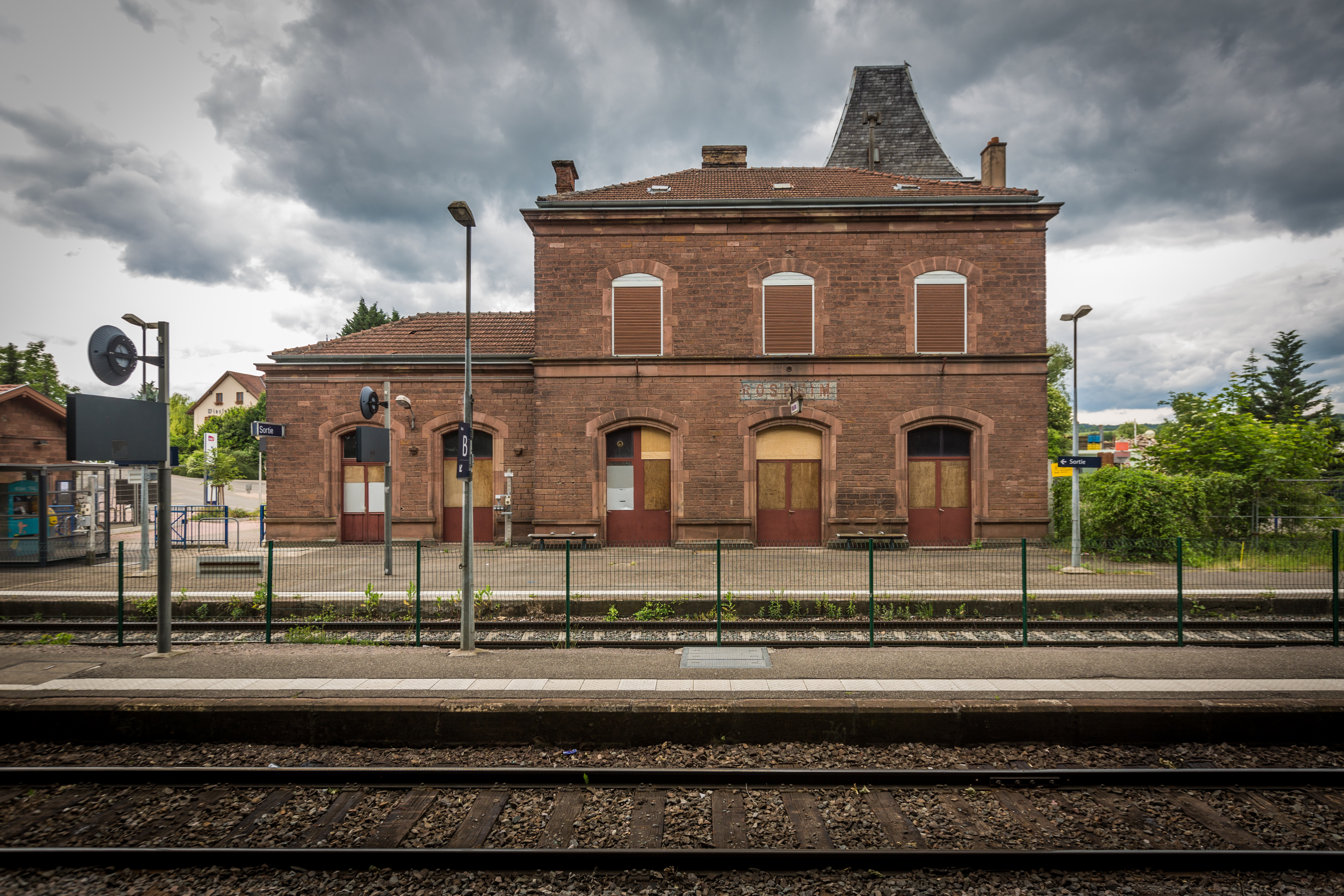 Gare de Rosheim